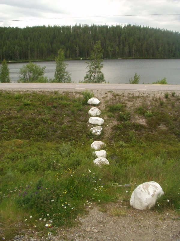 eigen foto